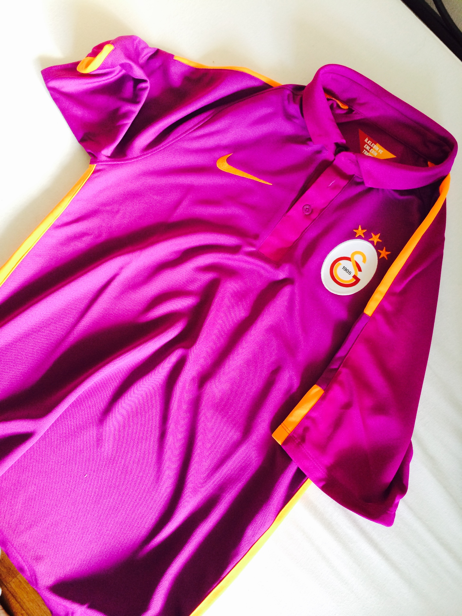 Nike'ın 2014-15 sezonunda Manchester City, Manchester United, Inter, Barcelona, Juventus ve PSG gibi 8 premium takımına uyguladığı aynı kalıptan 3. formalar serisinde Galatasaray'a "mor" renkte forma hazırladı.